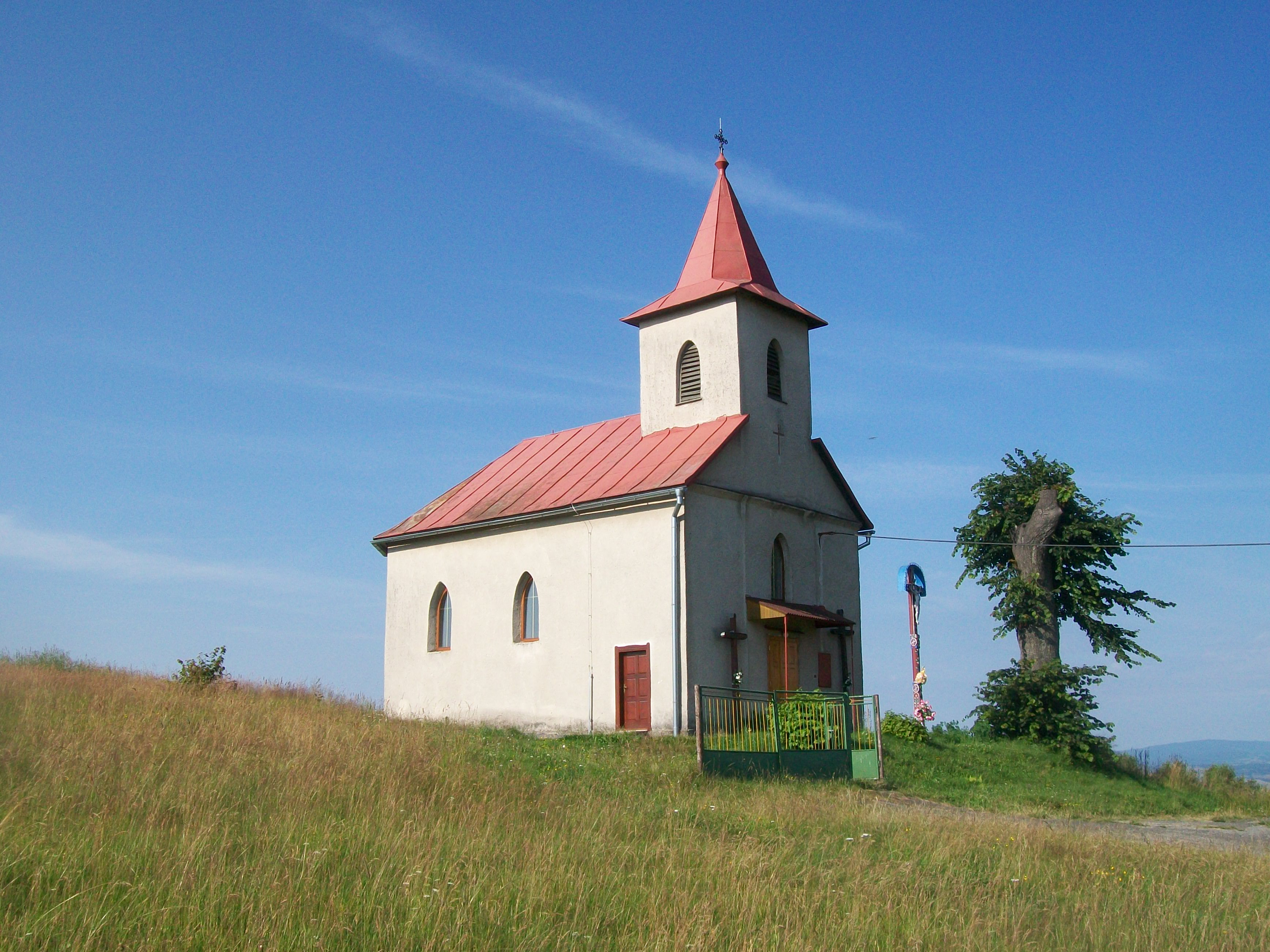 Kaplnka Najsvätejšieho Srdca Ježišovho v Brestine je z roku 1941.